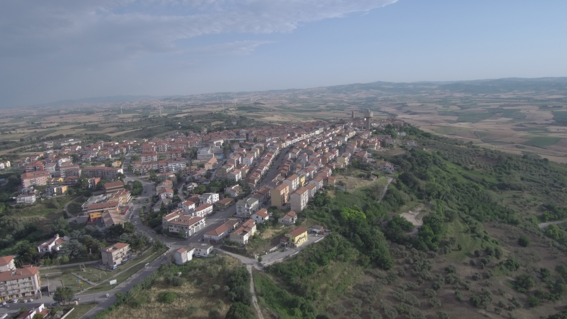 San Martino in Pensilis fotografada desde um drone. Foto de Siloé Mascolo.